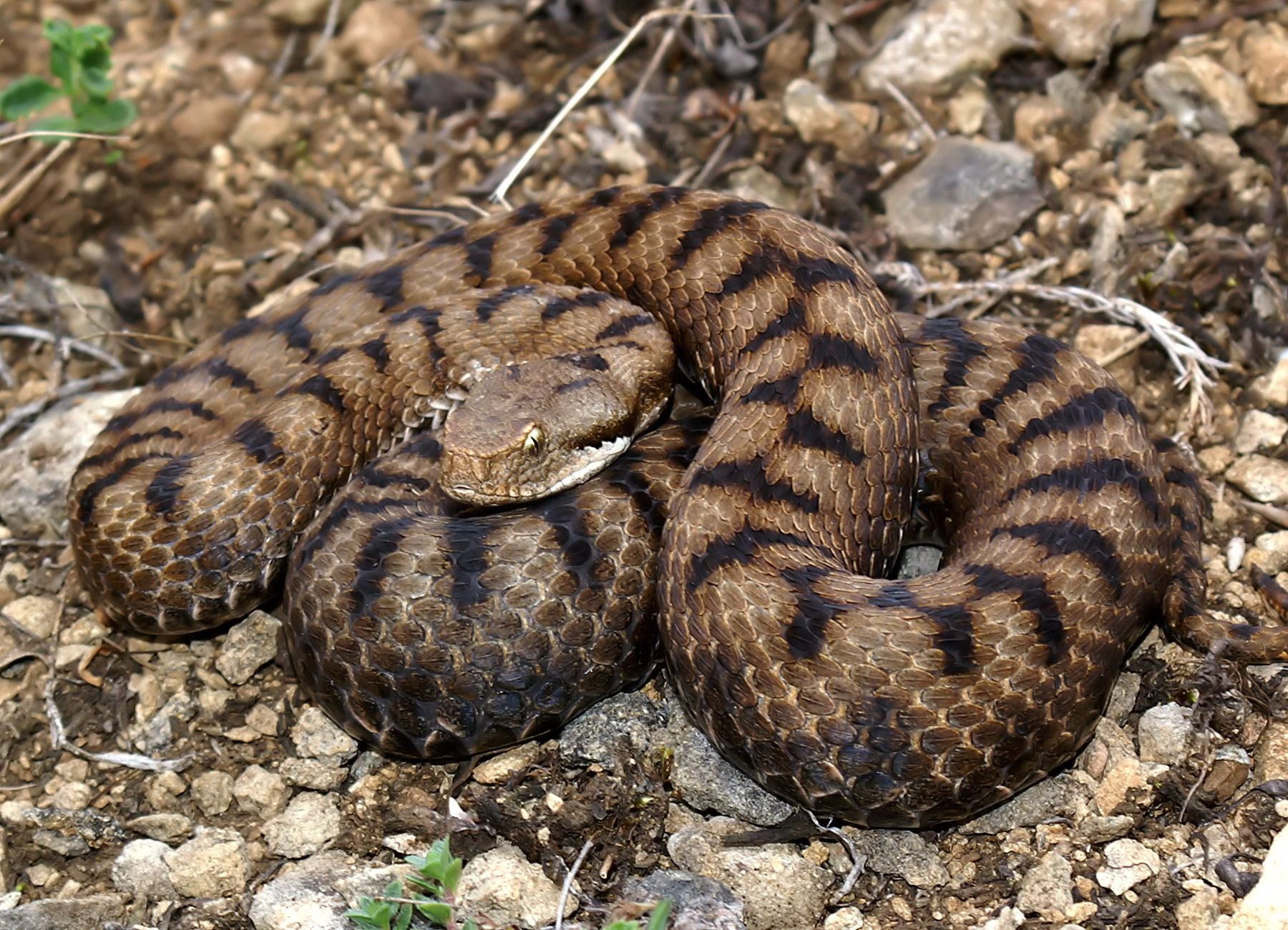 Vipera aspis female - adult